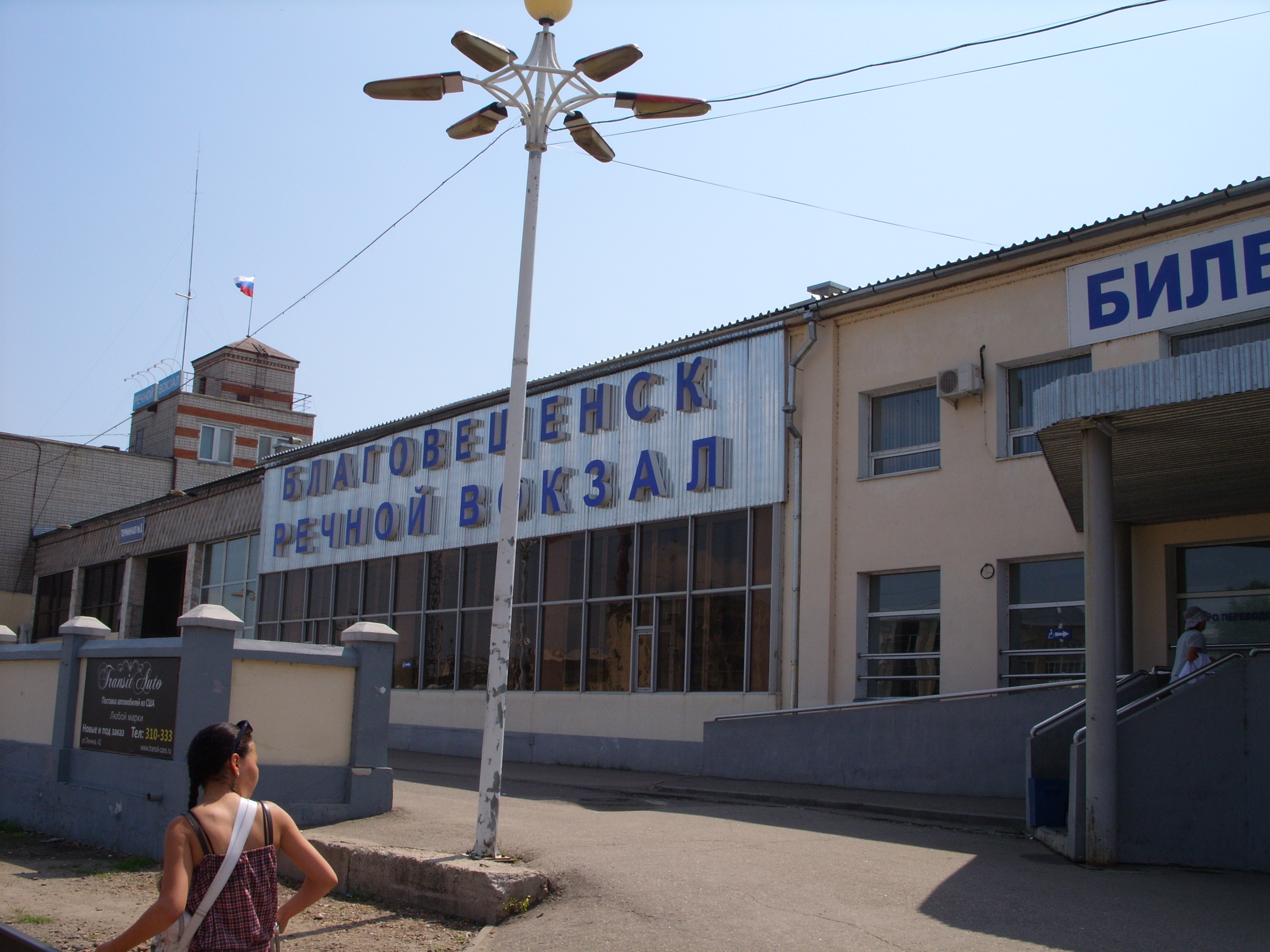 Амурская область, Россия. Снимки августа 2011 г.